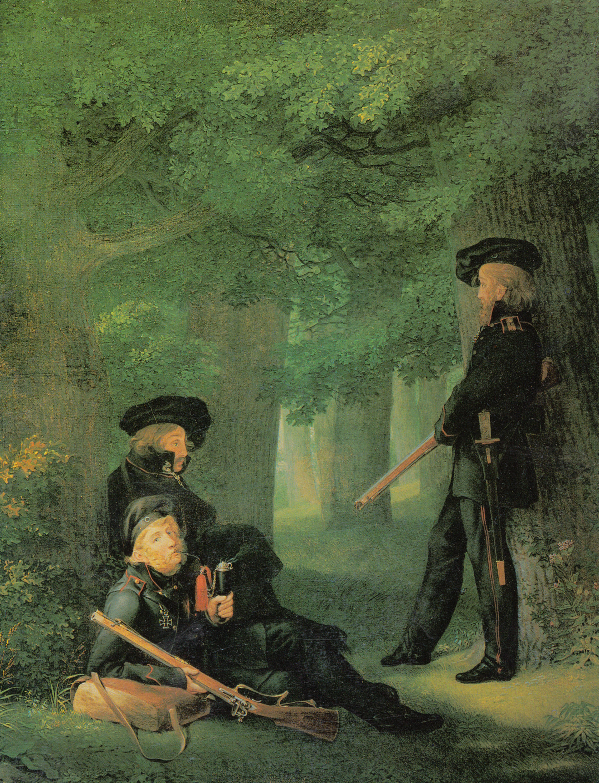 Theodor Körner, Karl Friedrich Friesen and Henry Hartmann as „Lützower Jäger“ (literally Lützow hunters).